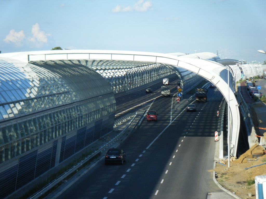 Droga ekspresowa S8 (Trasa Toruńska).